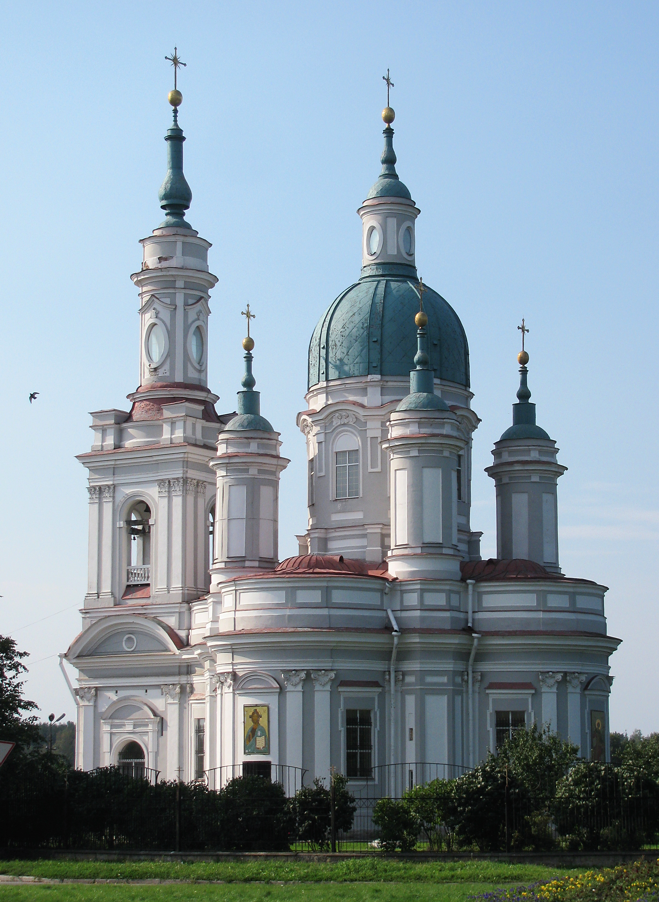 Ямбург, Екатерининский собор